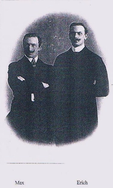 Scan eines alten Familienfotos